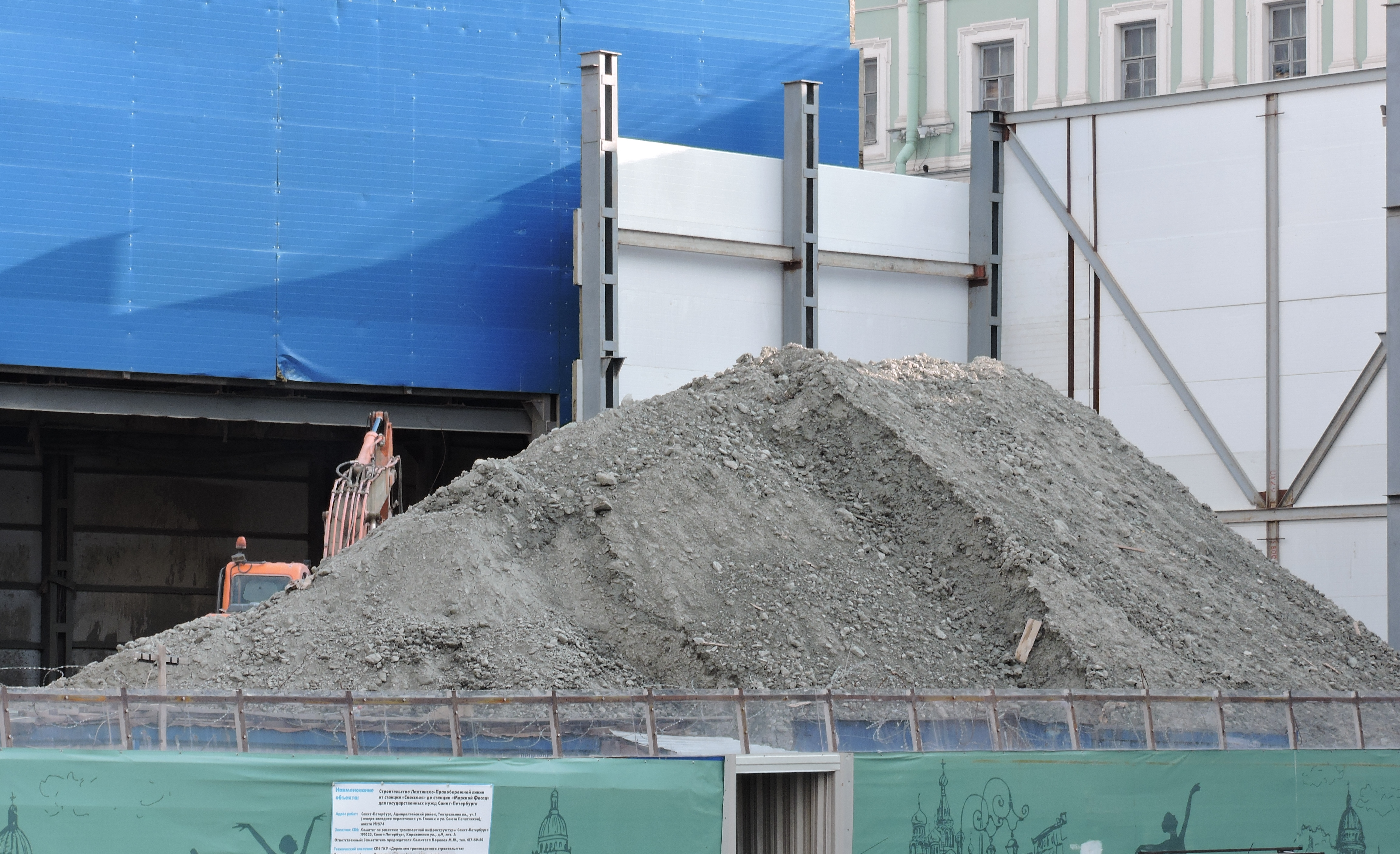 Строительство "Театральной" в СПб